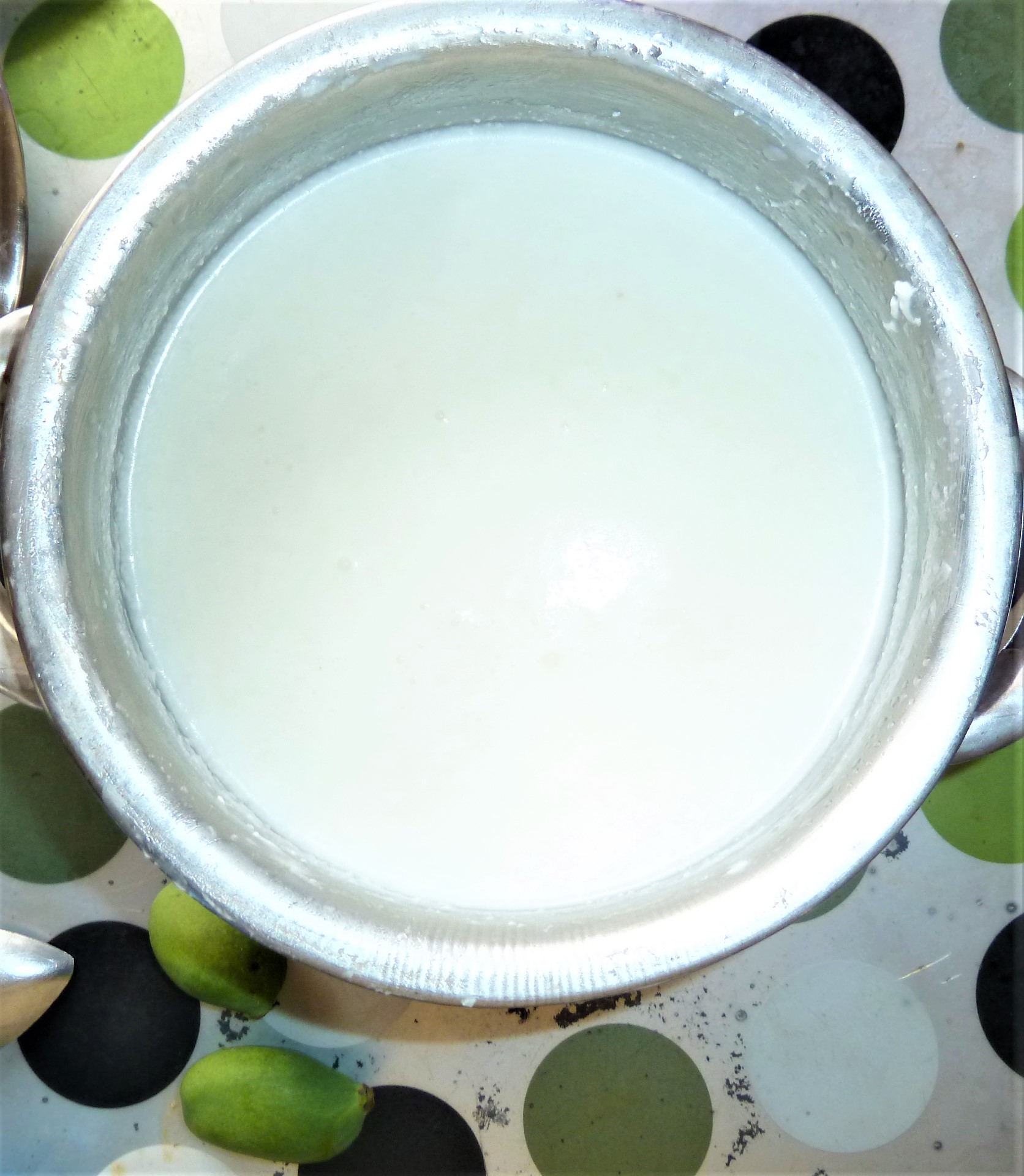 మజ్జిగ